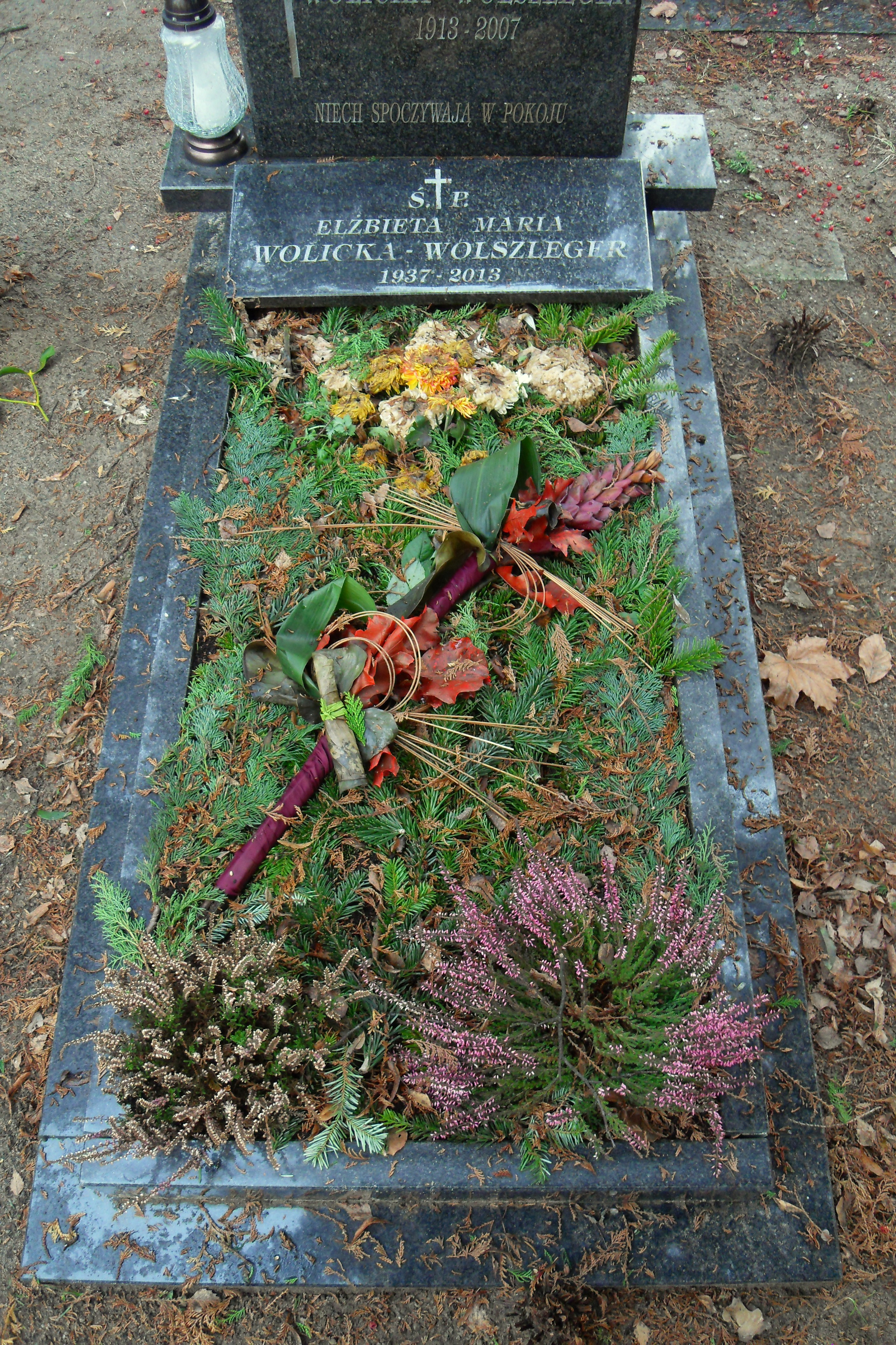 Gdańsk Oliwa. Cmentarz Oliwski, grób filozofa i historyka sztuki Elżbiety Wolickiej-Wolszleger (1937-2013).